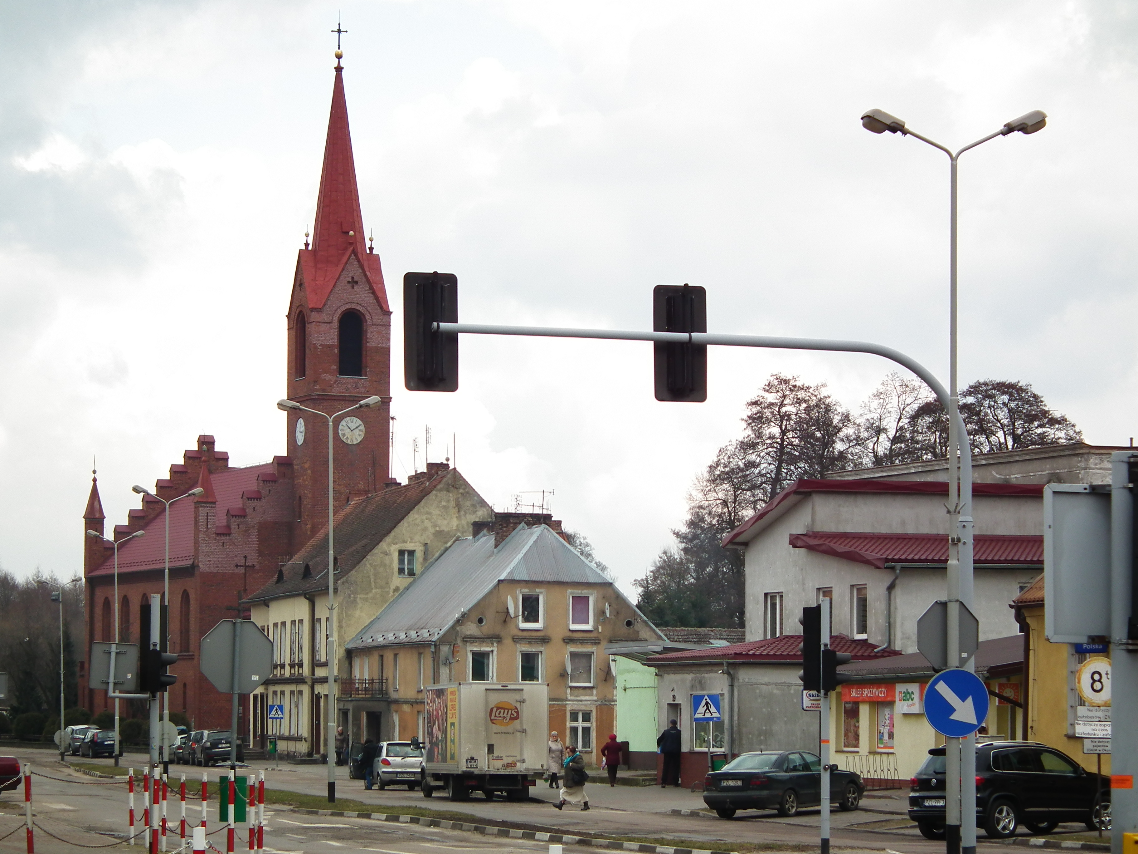 Centrum Okonka.